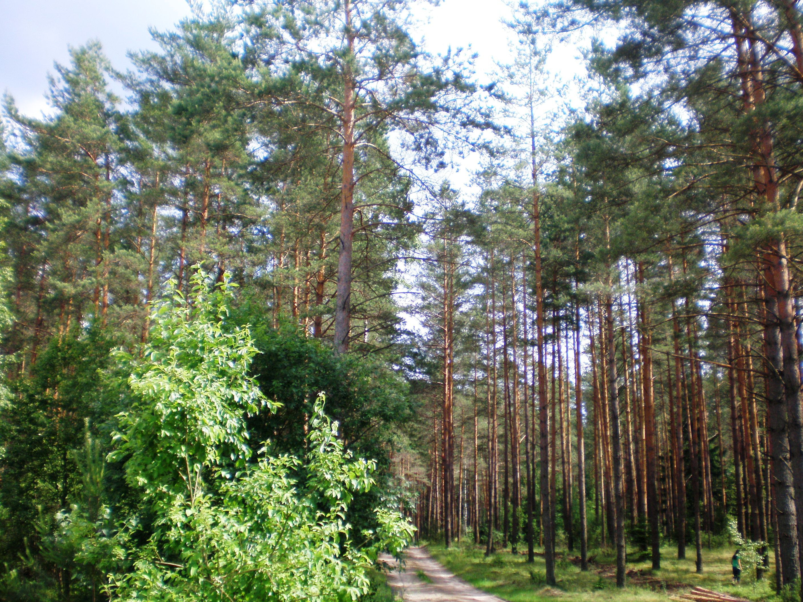 Dainavos giria, Druskininkų sav.